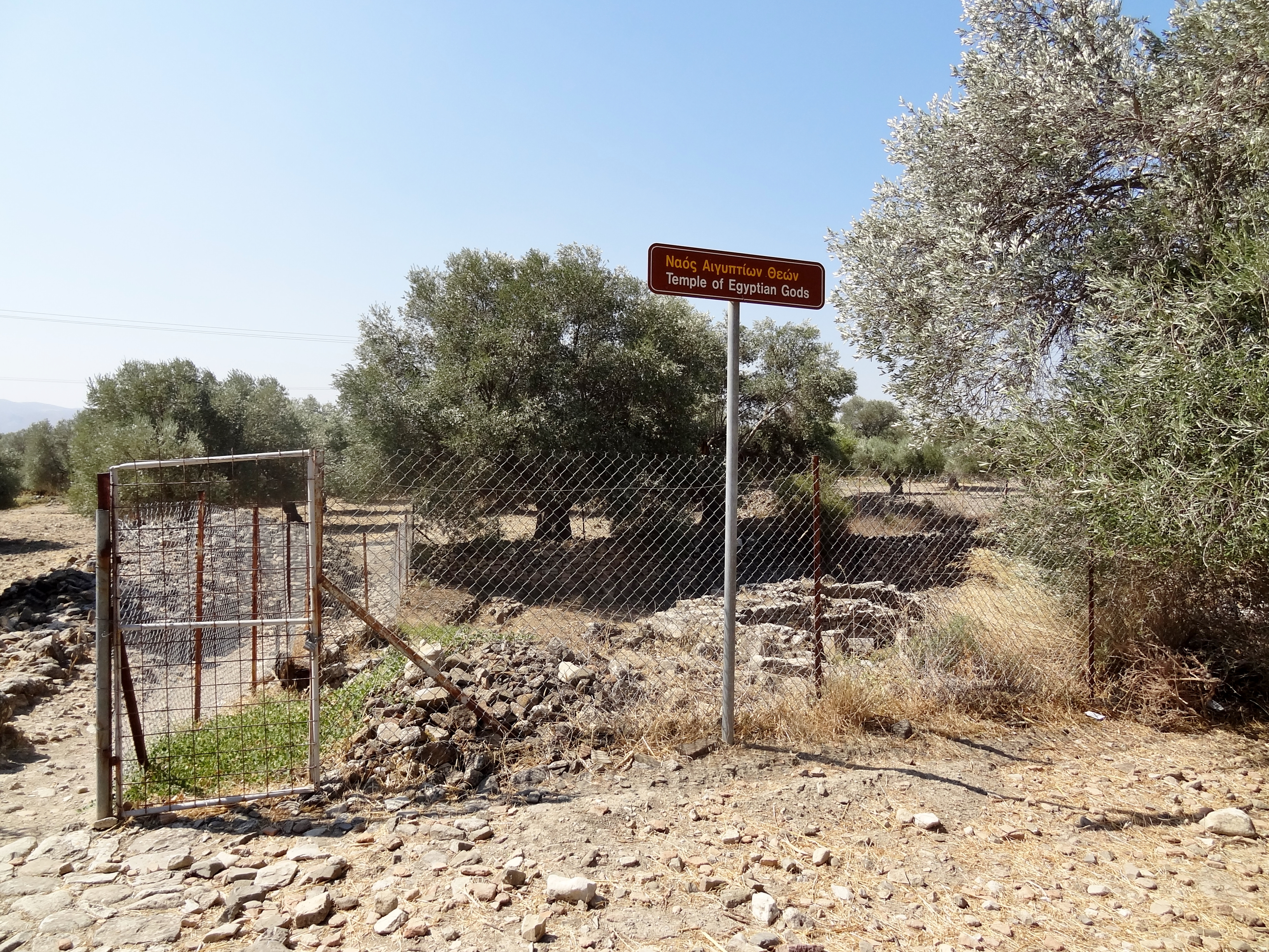 Reste der griechisch-römischen Stadt Gortyn (Γορτύν), Gemeinde Gortyna, Regionalbezirk Iraklio, Kreta, Griechenland